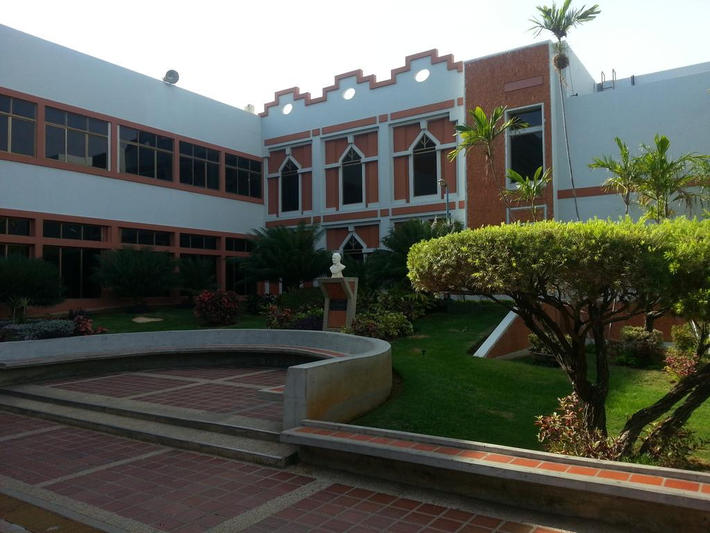 Plaza dedicada al epónimo de la universidad.